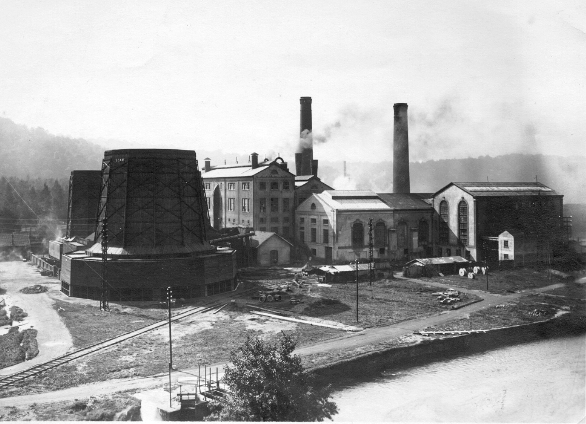 La centrale thermique de Ronchamp en fonctionnement.